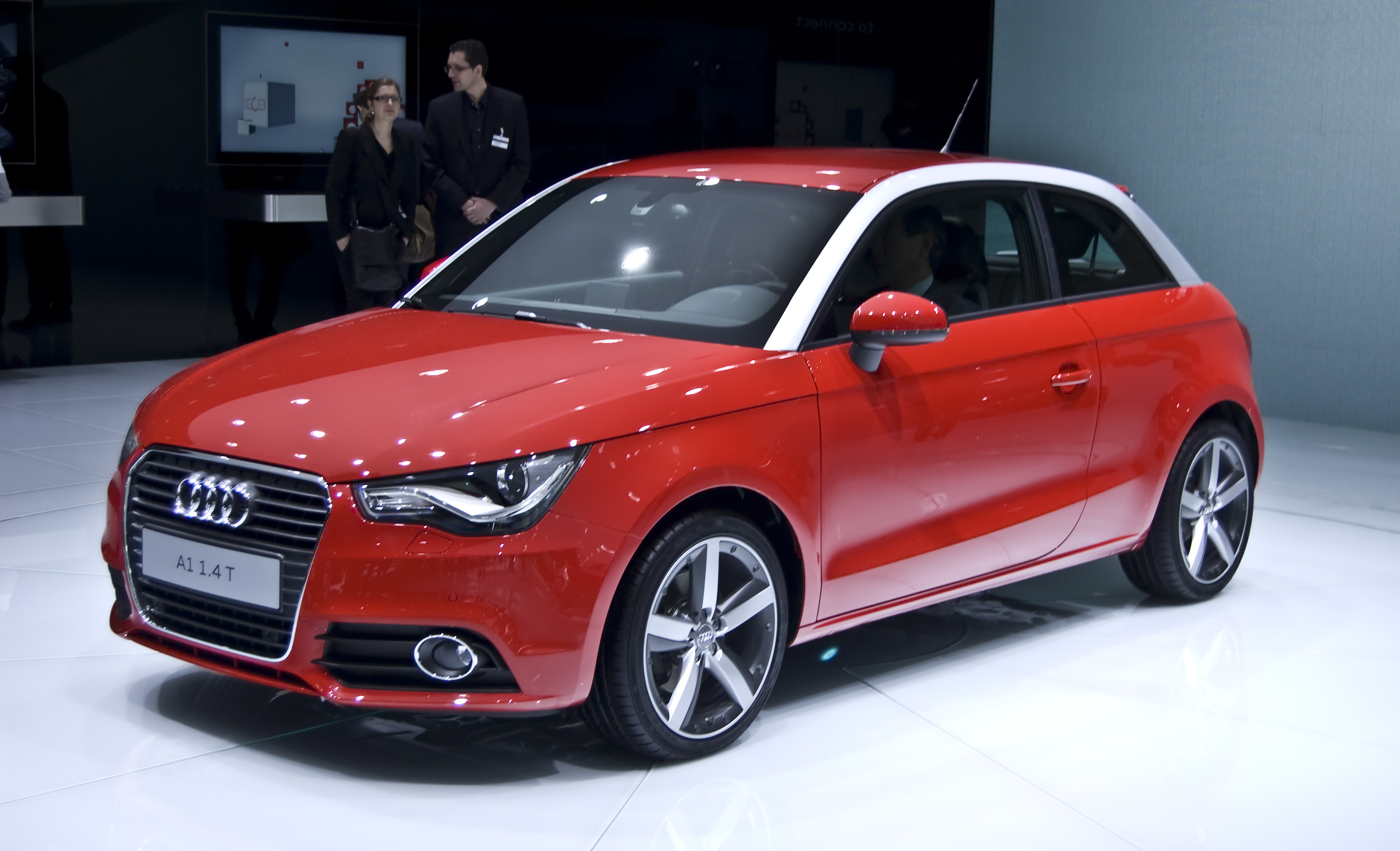 Audi A1 en el Salón de Ginebra 2010.